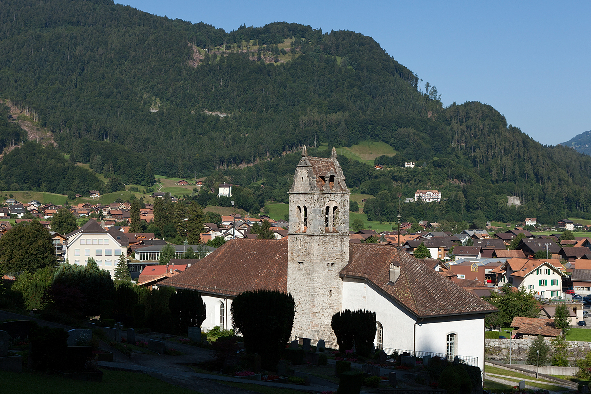 Kirche von Gsteig (Gemeinde Gsteigwiler) mit Wilderswil